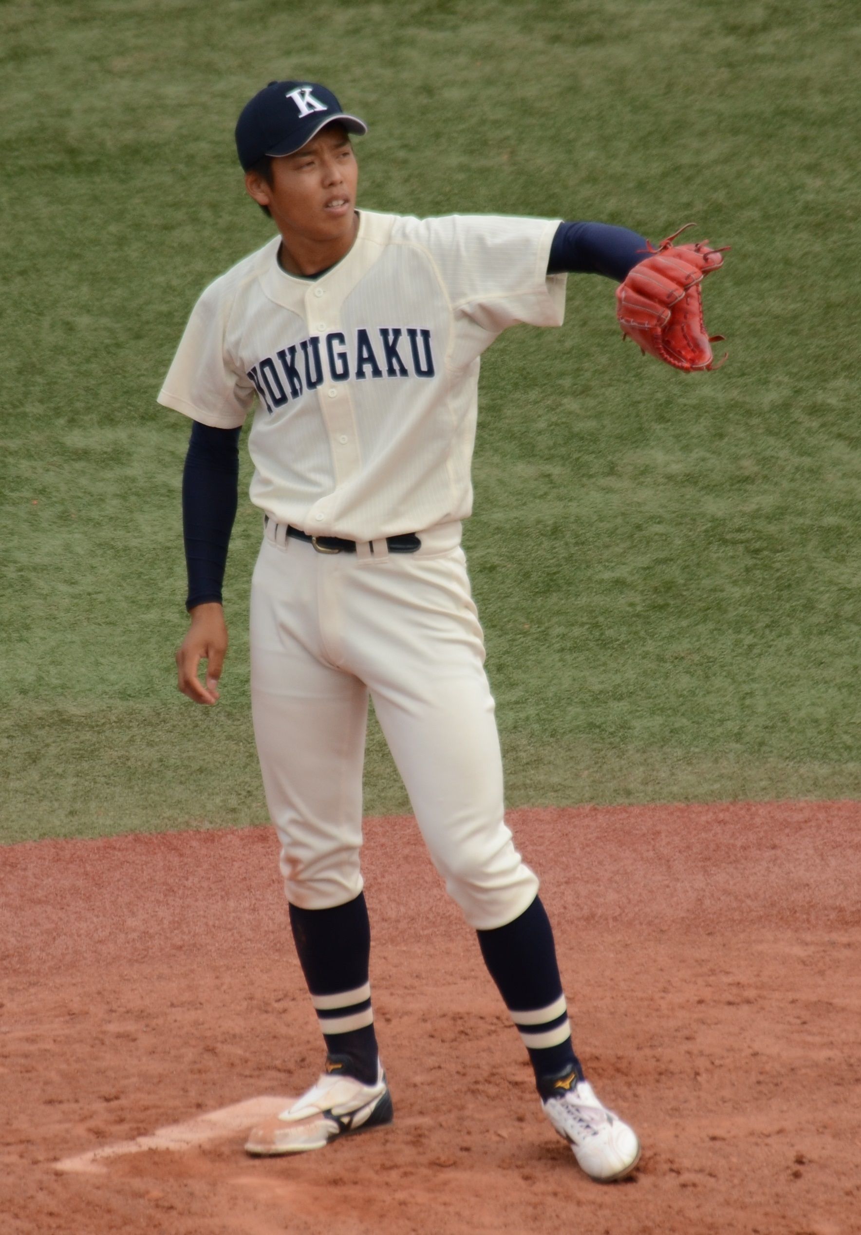 國學院大學硬式野球部の杉浦稔大投手。東都大学野球2013年秋季リーグ、対亜細亜大学第3回戦。明治神宮野球場にて。